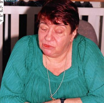 Françoise Verny, éditrice française.